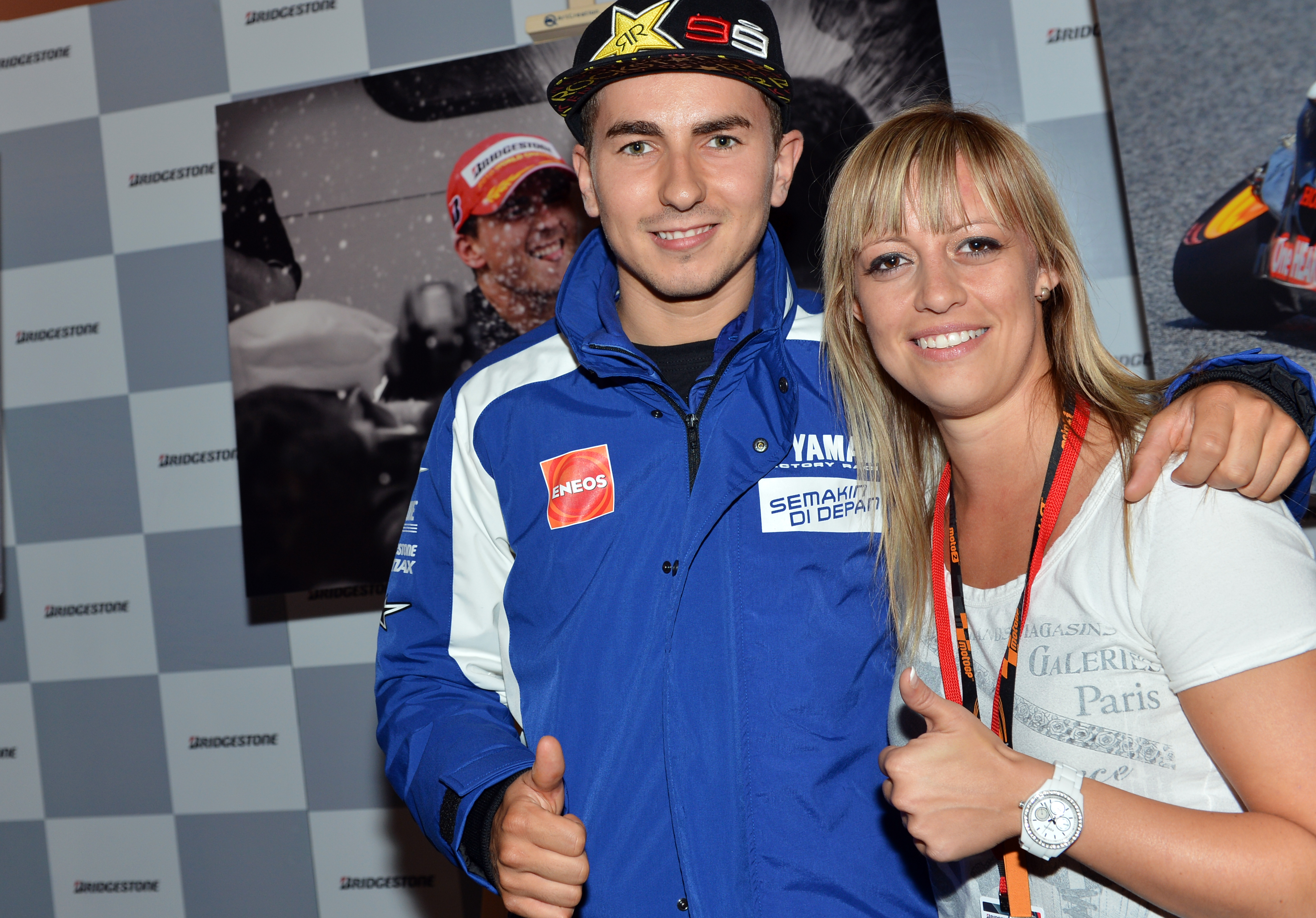 Kovács Niki és Jorge Lorenzo a 2012-es Bridgestone MotoGP-fotópályázat győztes képével